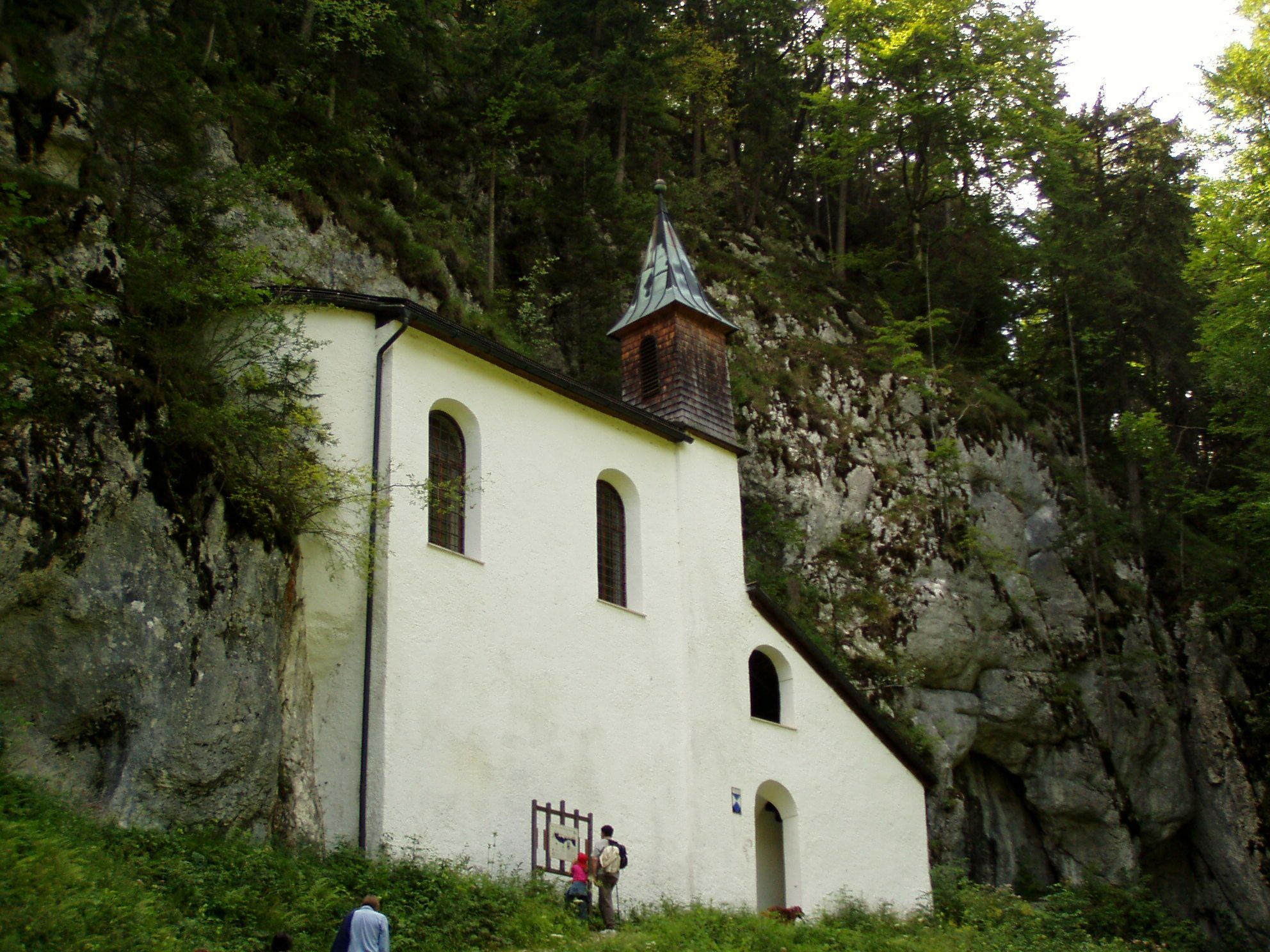 Falkensteinkirche bei St.Gilgen